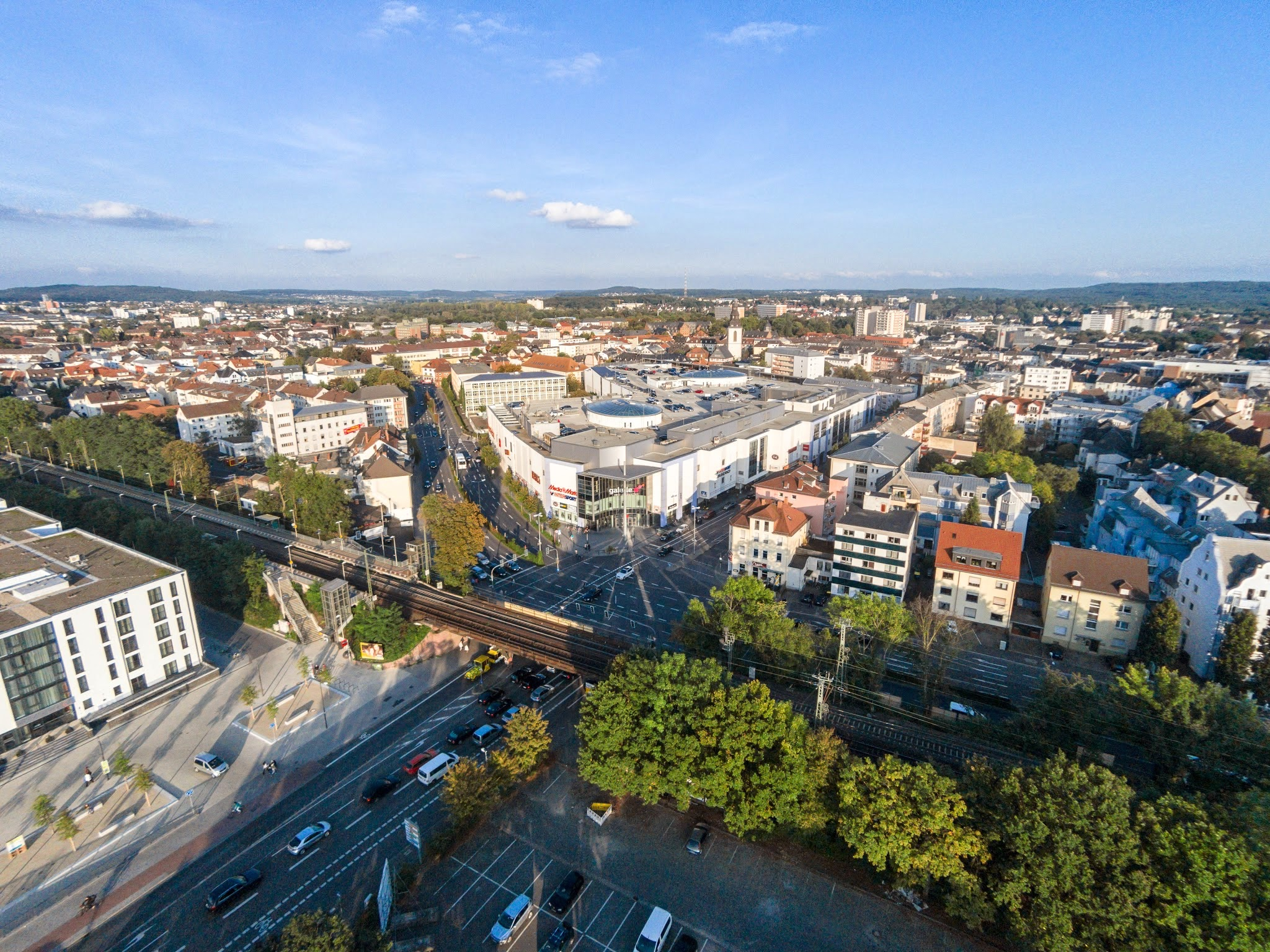 Luftbild Neustädter Tor in Gießen